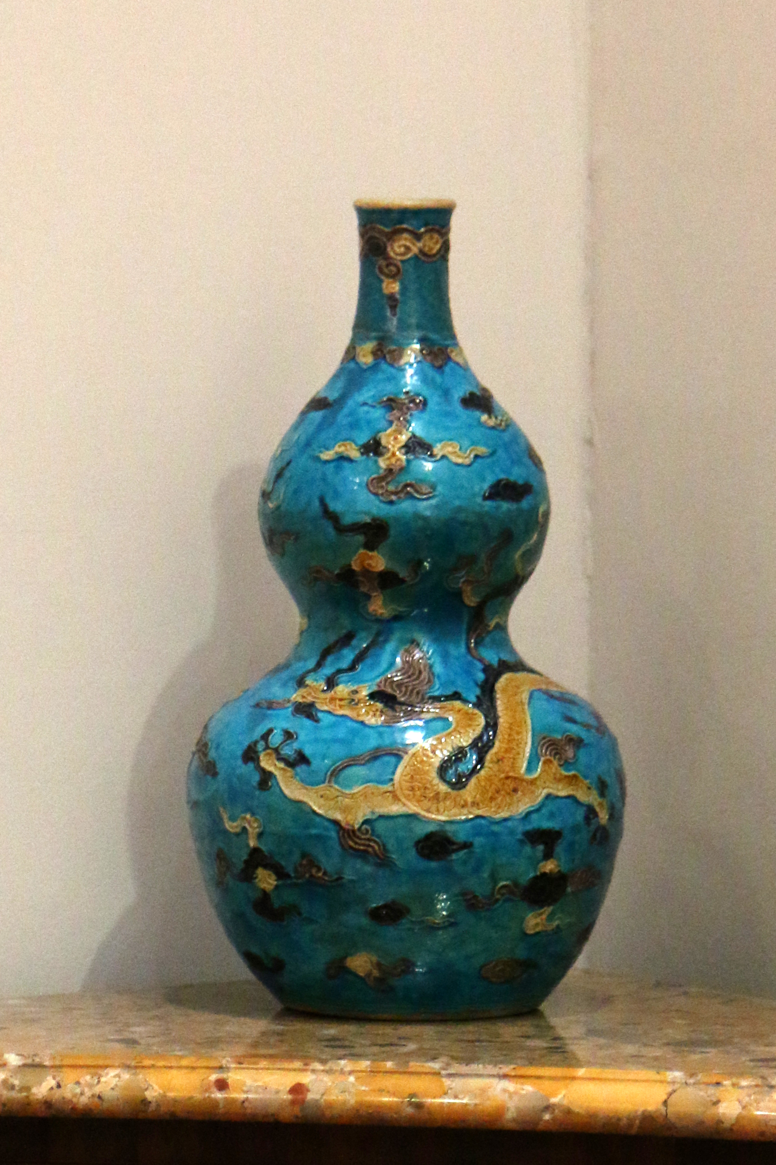 Vase de forme gourde, hauteur = 40 cm, biscuit à décor de dragons poursuivant le joyau, Chine époque Ming